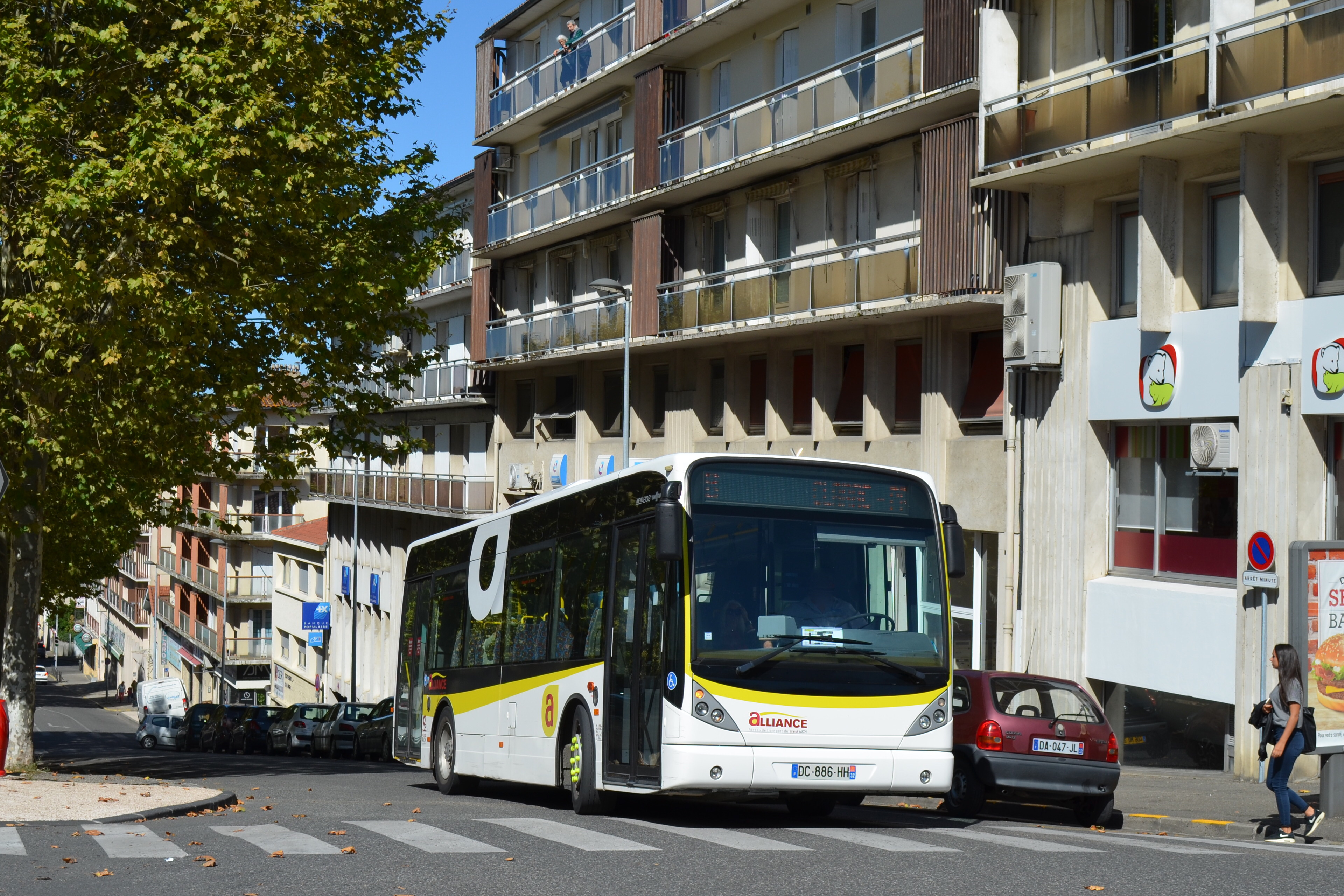 Bus de la ligne B arrivant aux allées Baylac à Auch.